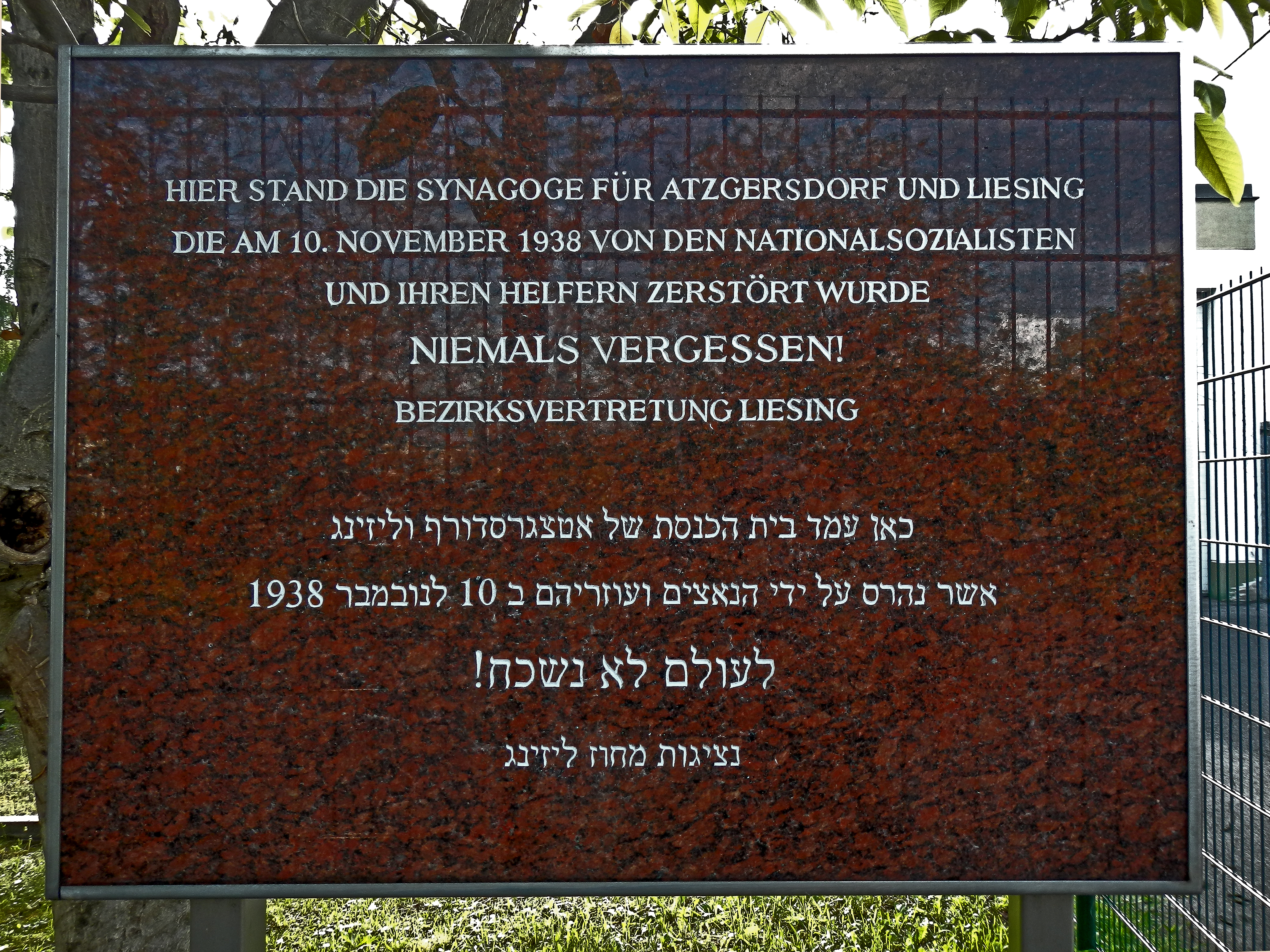 Standort der ehemaligen Synagoge Atzgersdorf, Dirmhirngasse 112-114, Liesing, Wien 23, Österreich im Jahr 2014. Außer einer Gedenktafel erinnert nichts mehr an das 1938 zerstörte Gebäude